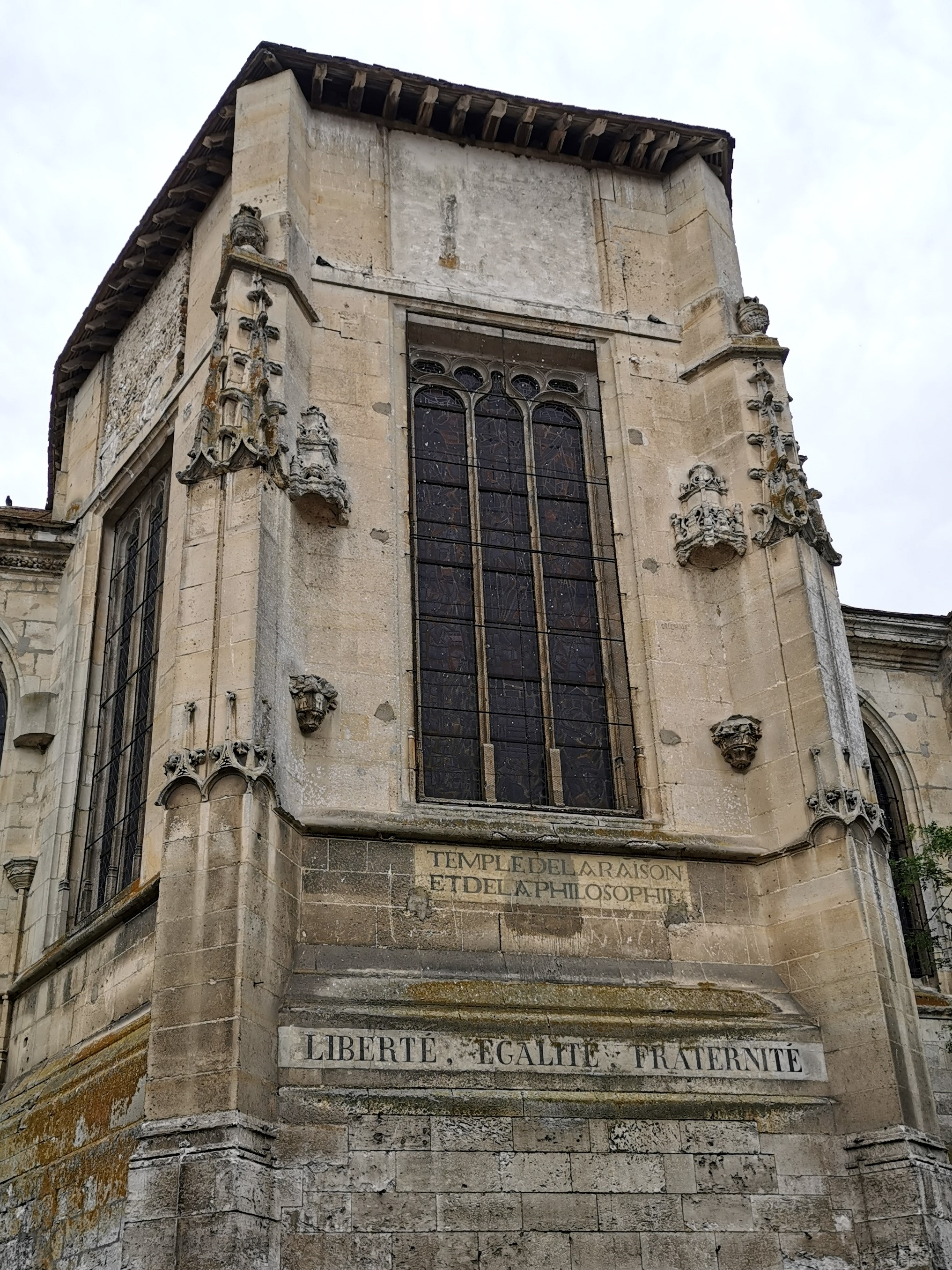 Inscription révolutionnaire "Temple de la raison et de la philosophie" sur le chevet de l'église Saint Martin, Ivry-la-Bataille. Transformation de l'église en lieu de culte de la Raison, puis de l'Être suprême (1793-1794)